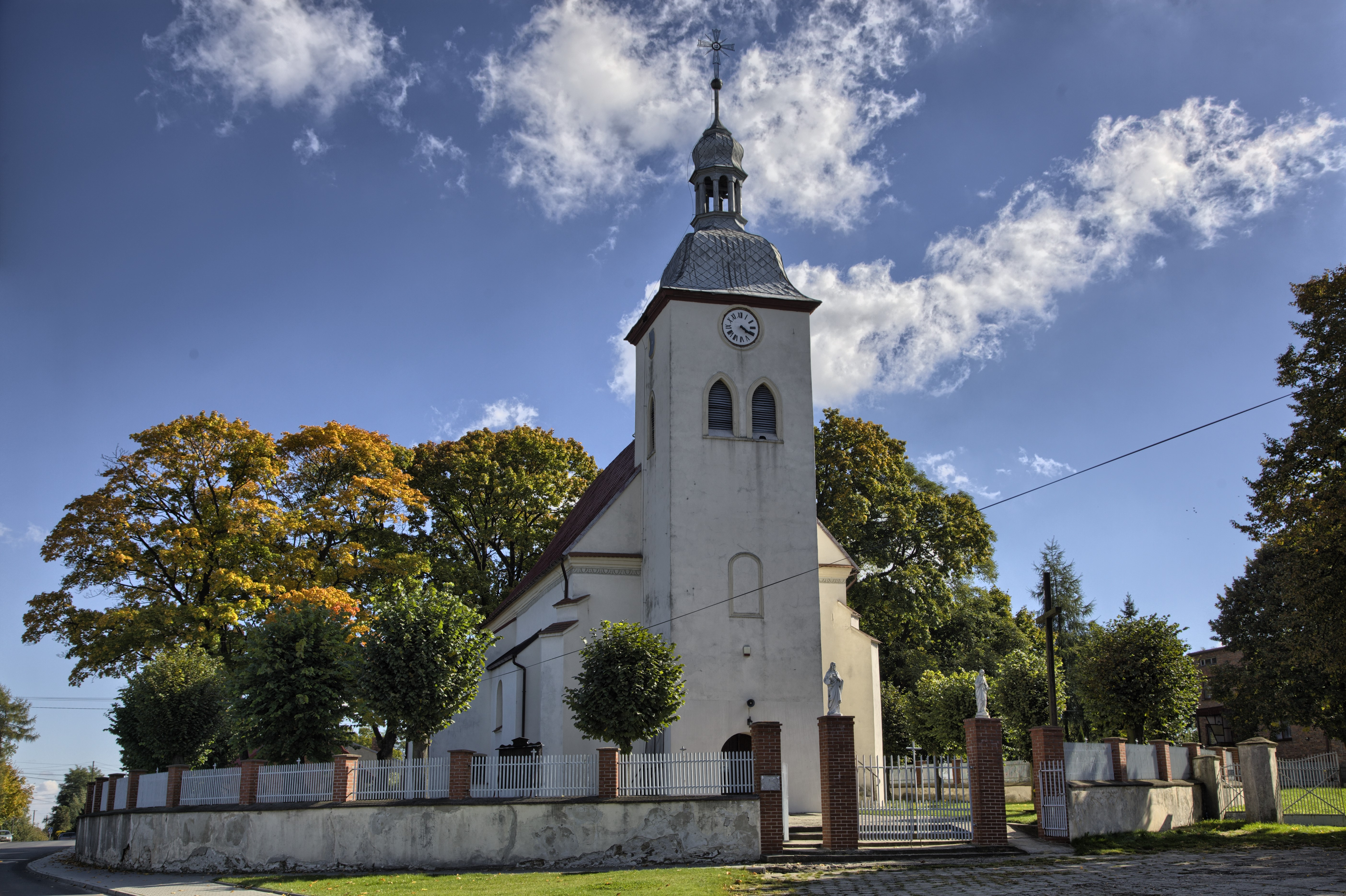 Chotów - kościół pw. św. Marcina, 1616